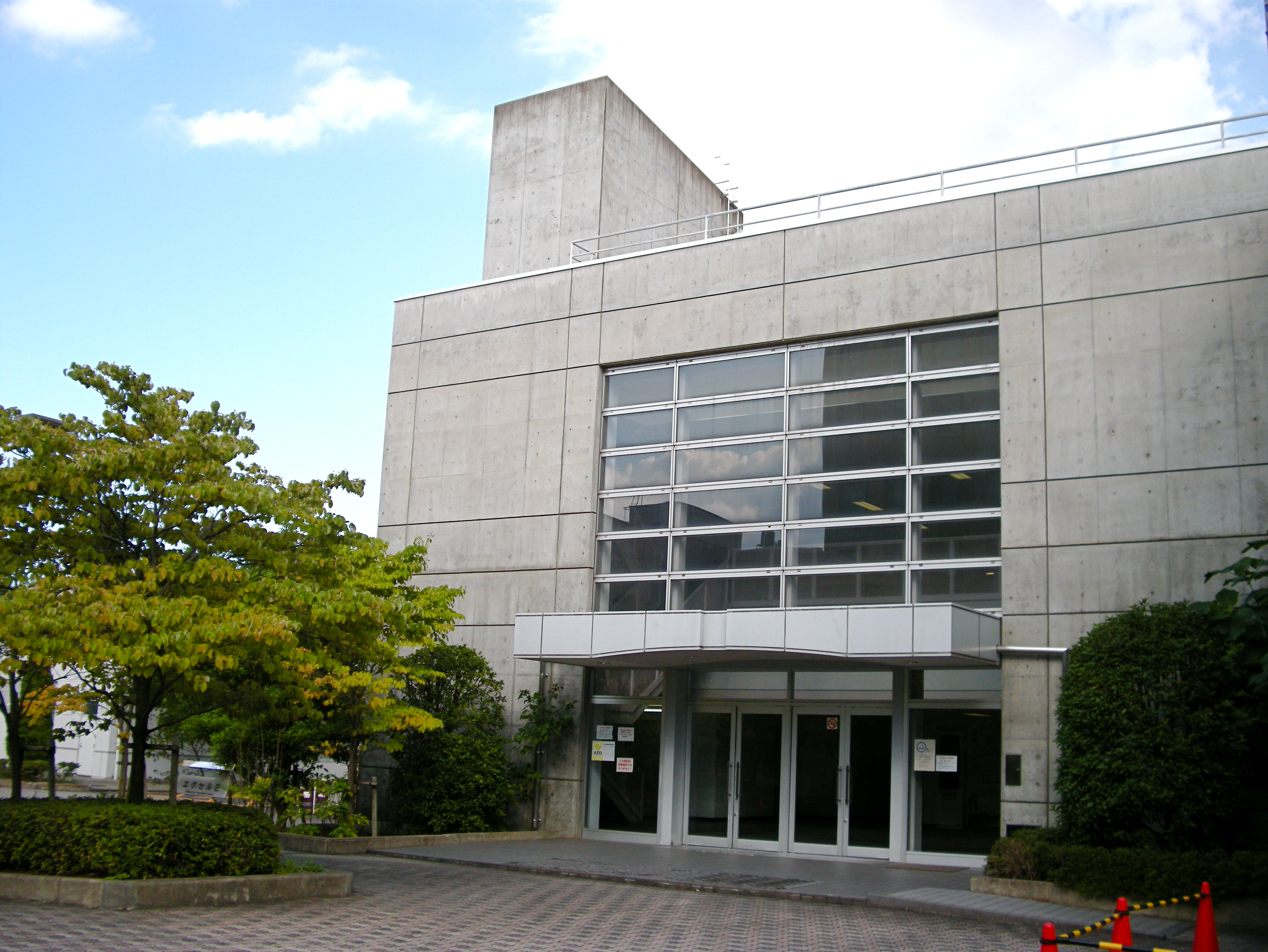 EXL-2 (Biwako Kusatsu Campus, Ritsumeikan University, Shiga, Japan)